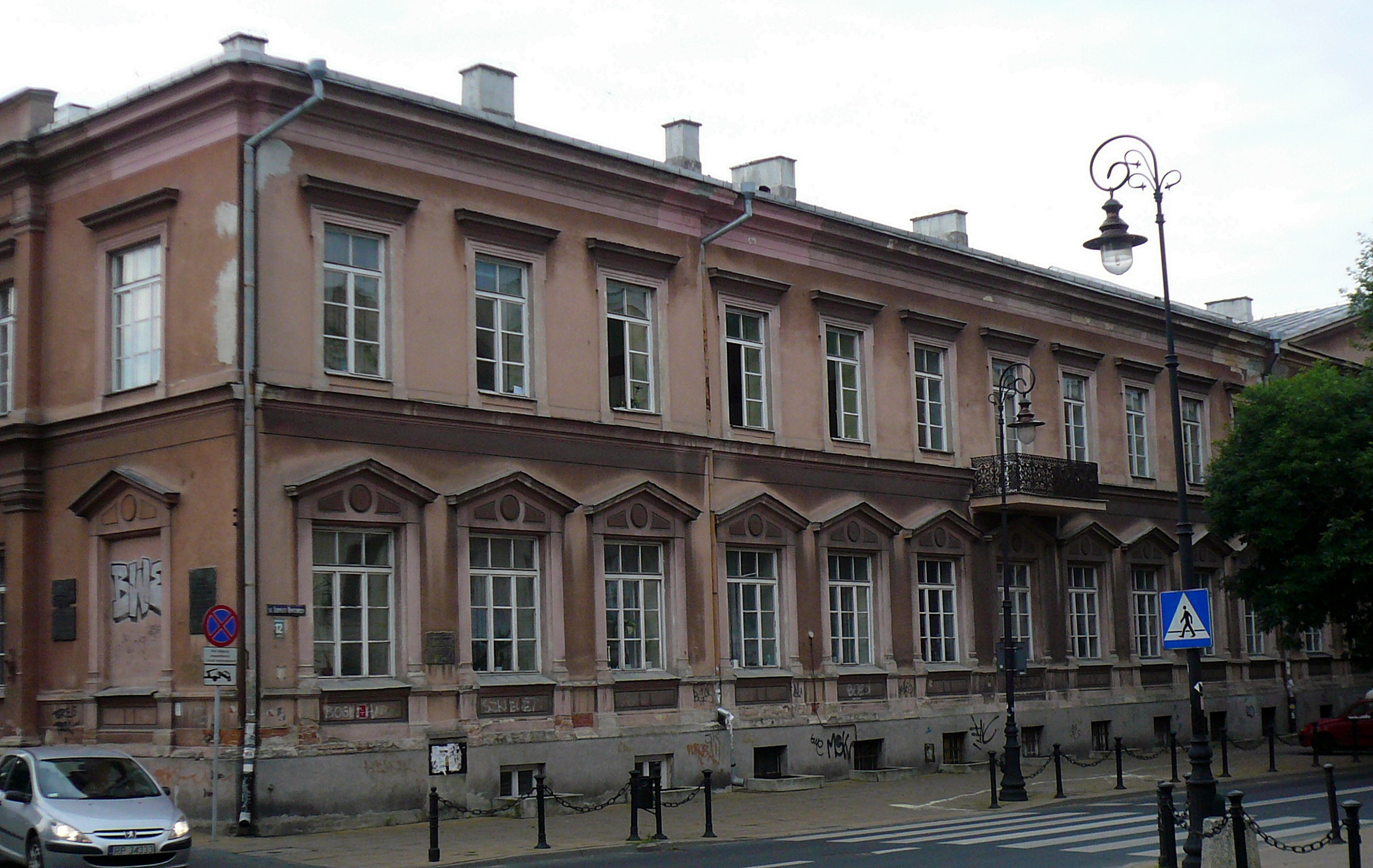 Dawna Szkoła Wojewódzka Lubelska, obecnie Wydział Psychologii i Pedagogiki UMCS - ul. Narutowicza 12 w Lublinie